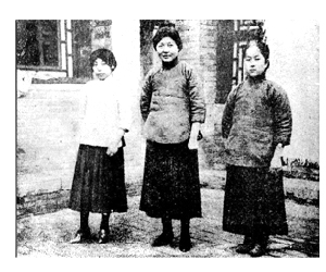 1920年2月，北京大学招收查晓园、奚浈、王兰三名女生入文科旁听，这是北京大学首次招收女旁听生。同年秋北京大学开始招收女生入学。